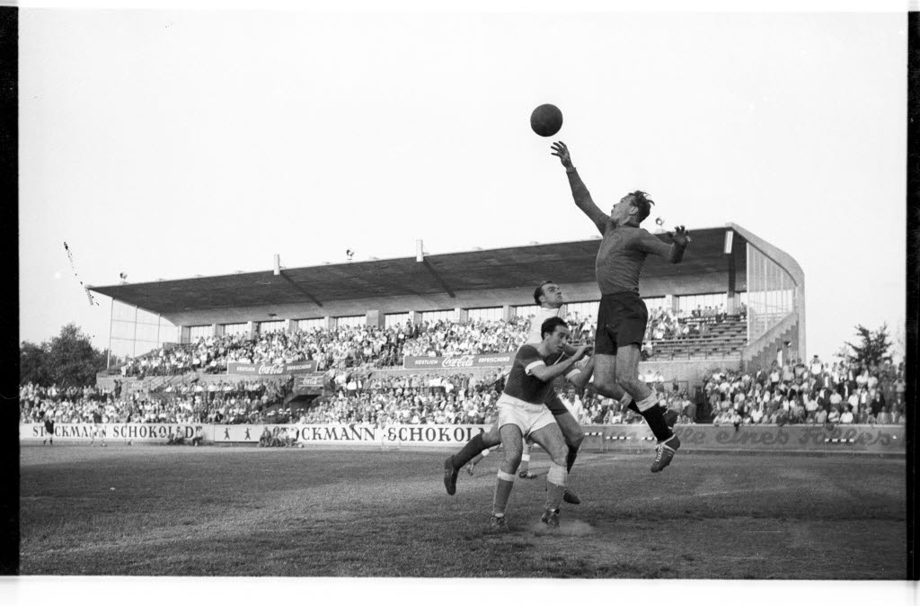 im Holsteinstadion. Berlins Torwart Lessel rettet vor Holsteins Mittelstürmer Alfred Bornemann (3.v.r., halb verdeckt).